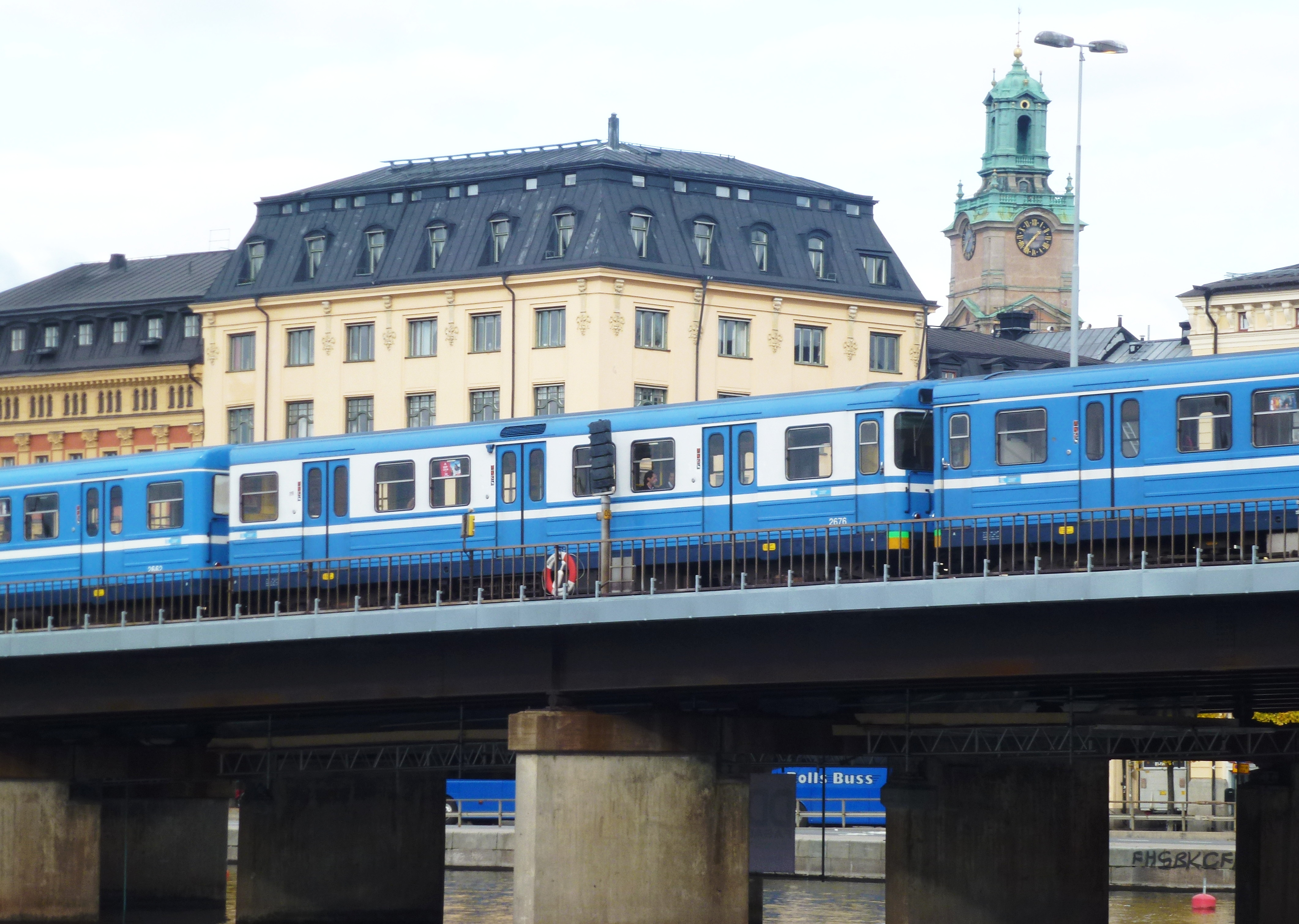 Blå-vit tunnelbanevagn typ C6 vid Slussen